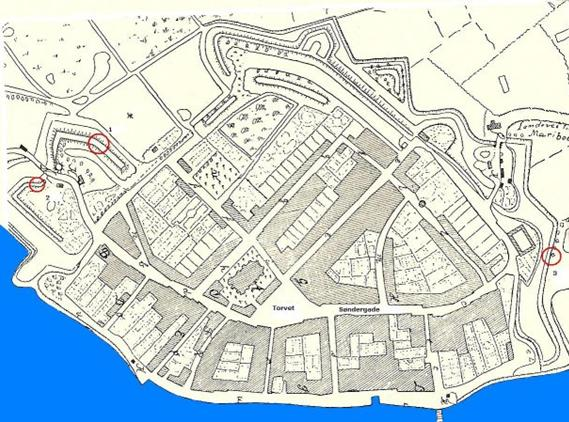 Volden på kort fra 1798.